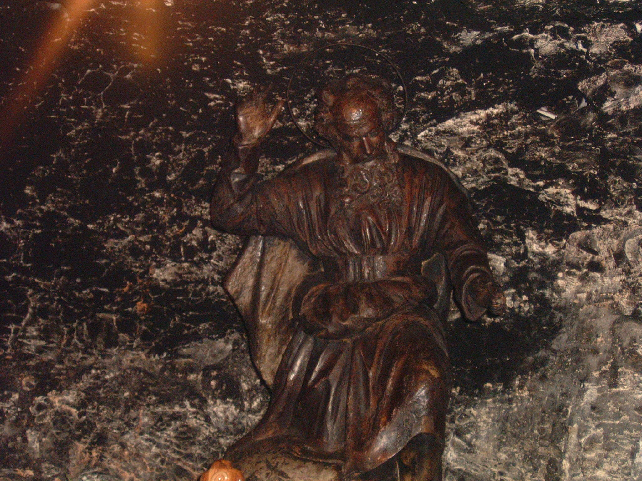 Foto scattata da me il 12 giugno 2008. Statua del profeta Elia